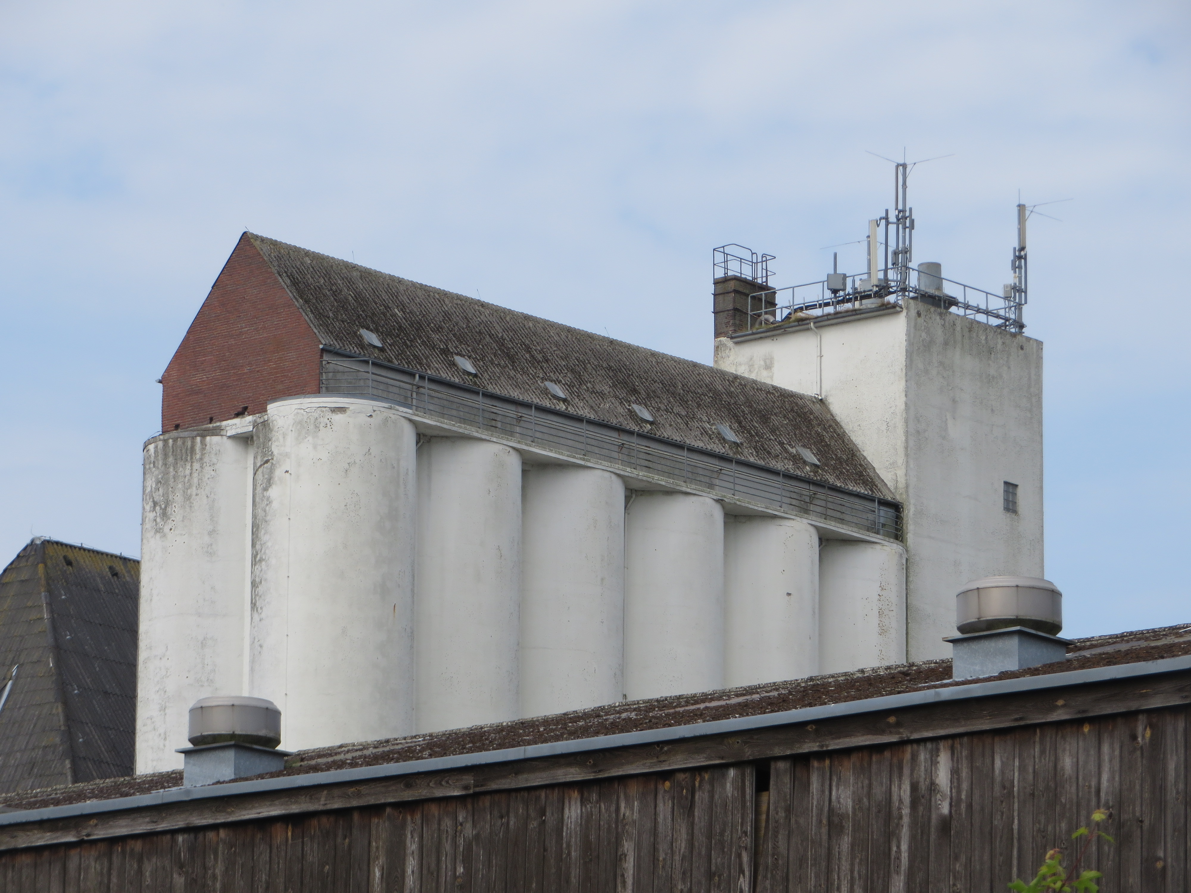 Angebauter Scheinriesen-Speicher am Hübsch-Speicher (Juni 2015)